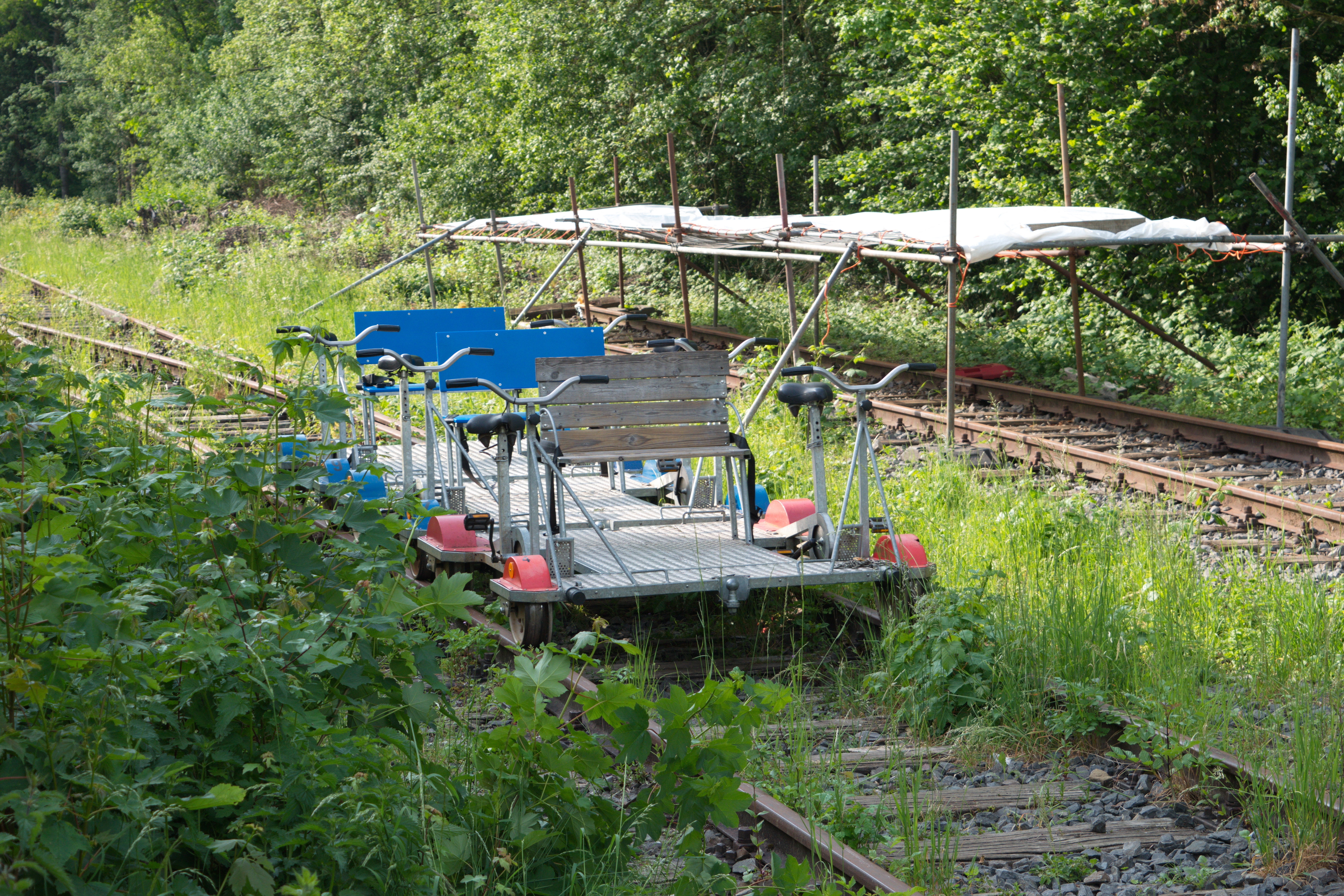 Am Kriegermal, Wuppertal